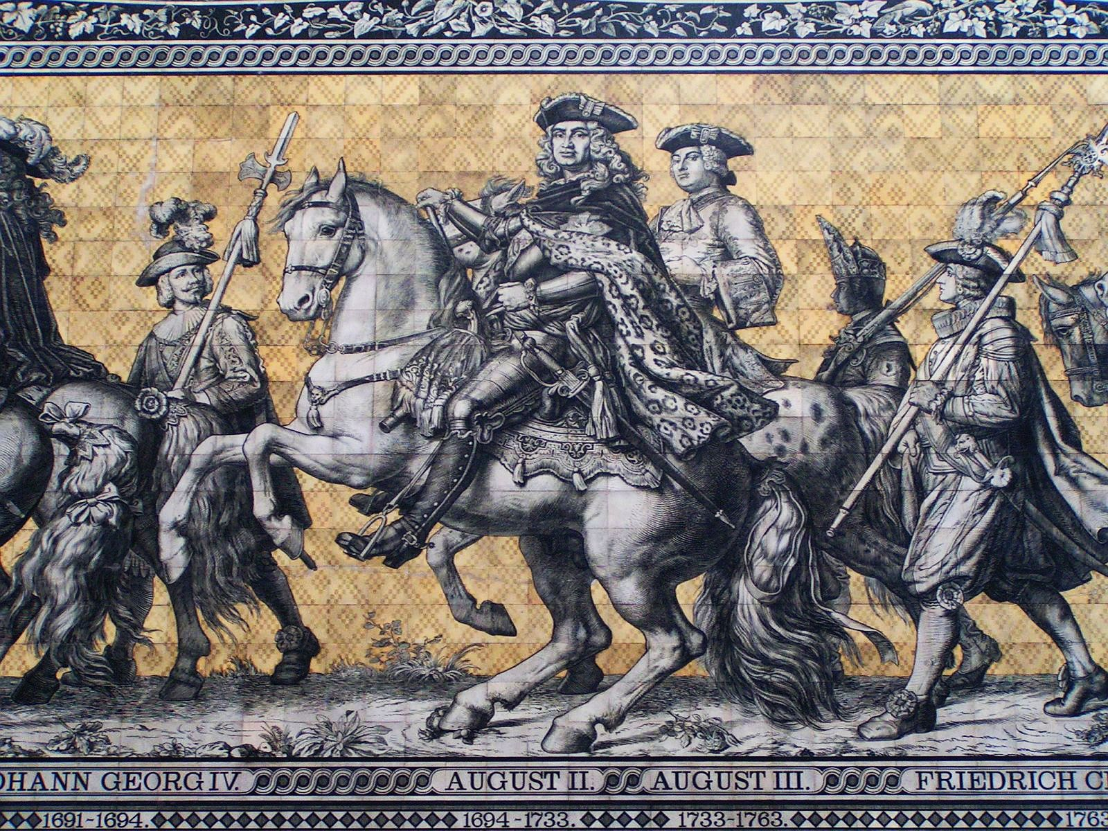 Dresden Fuerstenzug